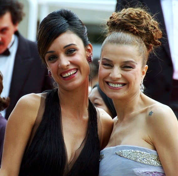 Martina Gusman et Elli Medeiros au festival de Cannes